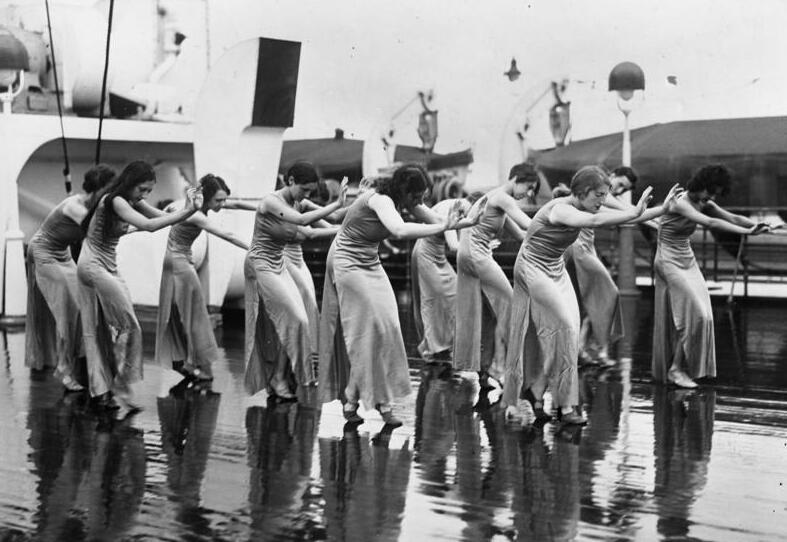 Moderner Tanz an Bord der "Bremen" ! Eine amerikanische Tanzschule übt während der Überfahrt in den Morgenstunden an Deck des Ozeanriesen "Bremen", um gut trainiert an das Ziel ihrer Gastspielreise zu gelangen.